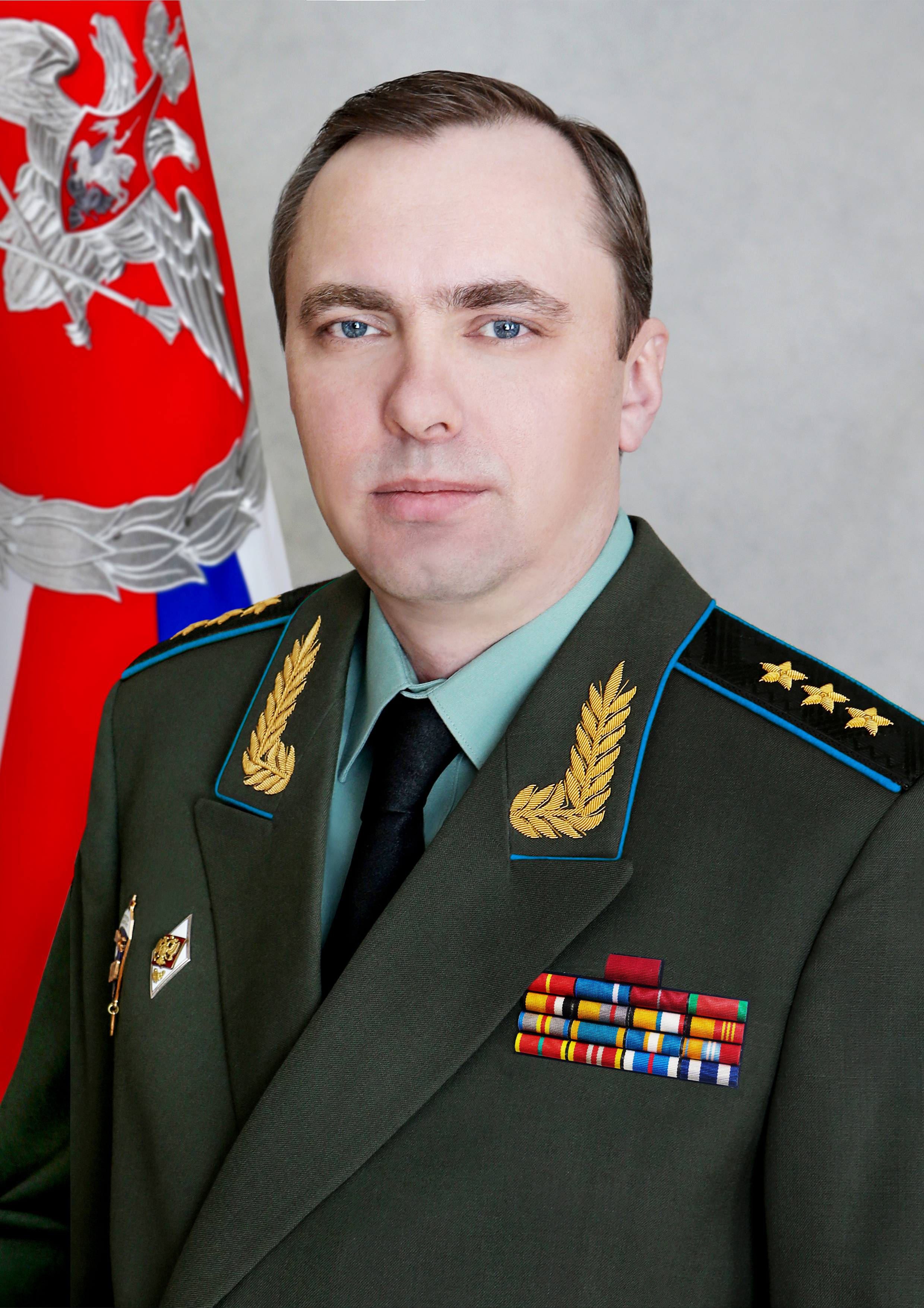 Заместитель Министра обороны Российской Федерации генерал-полковник Юрий Эдуардович Садовенко